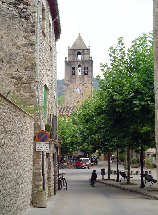 Sant Llorenç de La Muga, Spain.